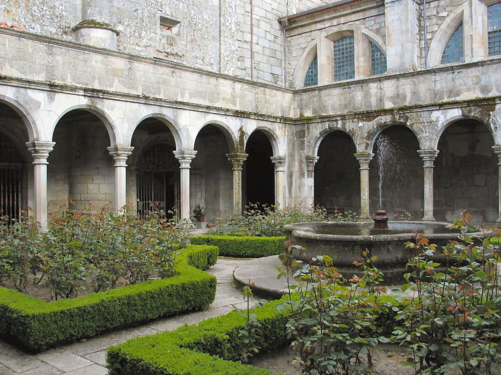 Claustro da Catedral de Lamego, Portugal/Cloister of Lamego Cathedral, Portugal